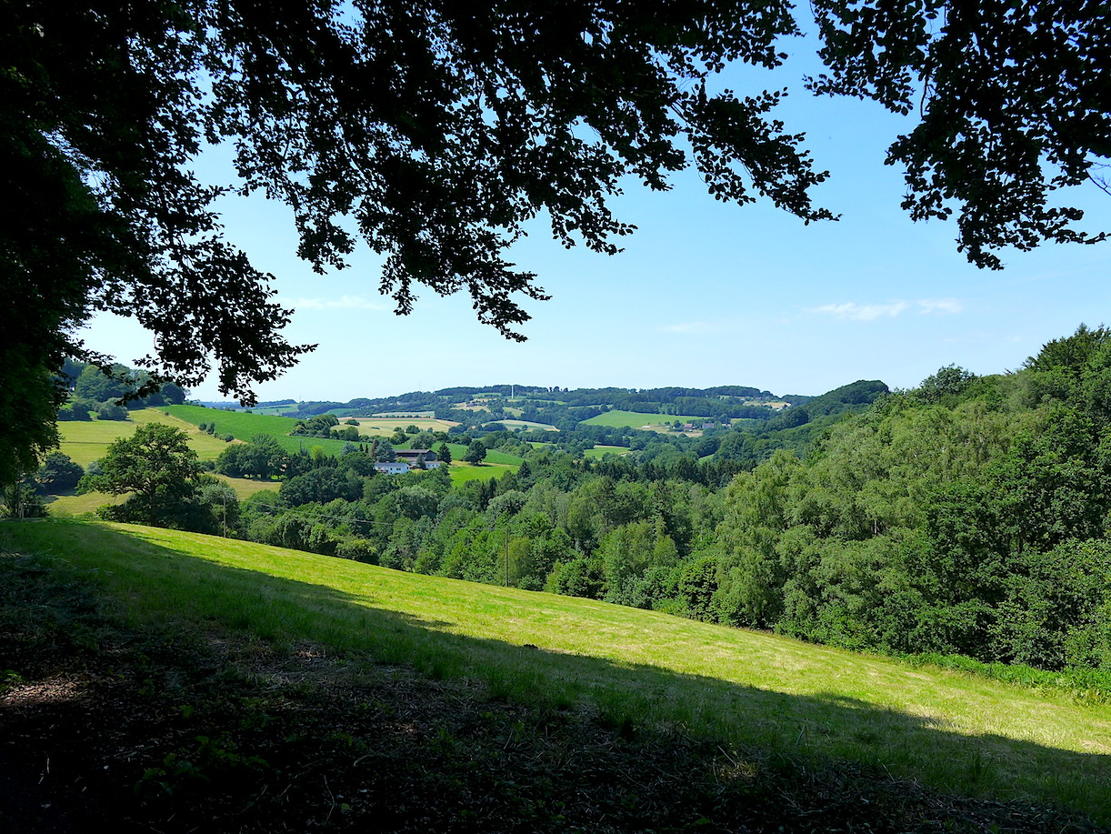 Этап "Нордрат-Ниренхоф" маркированного турмаршрута "Тропа Неандерланд", Северный Рейн-Вестфалия, Германия.